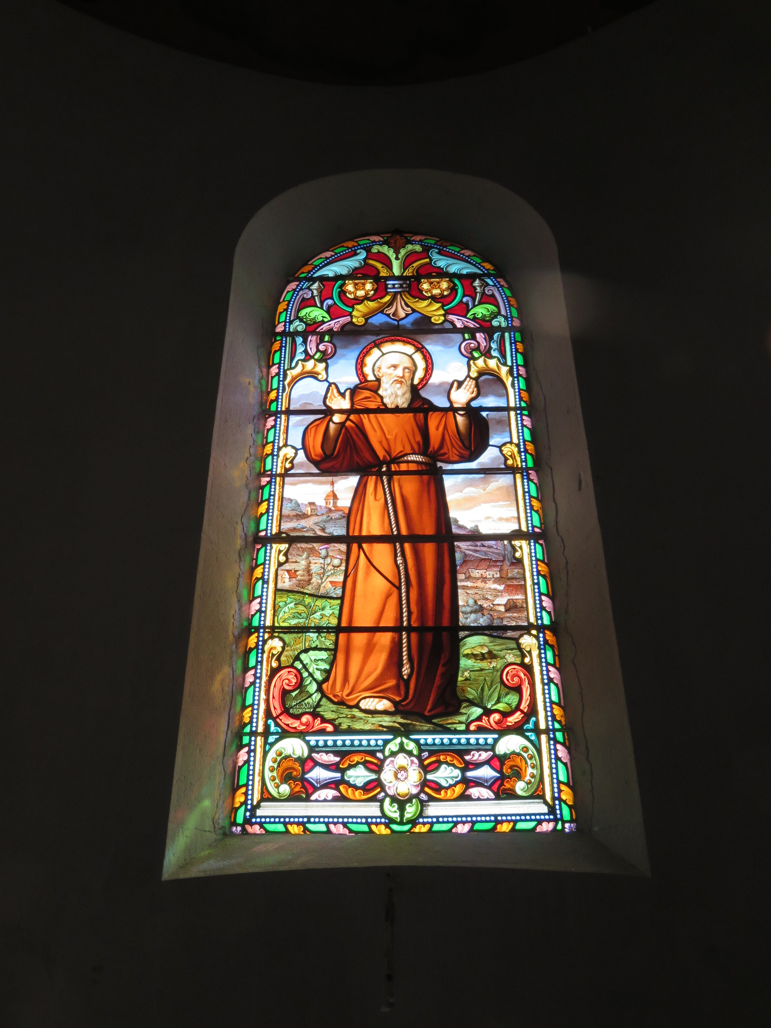 Saint Lautein (v448-518), vitrail de l'église de Saint Lothain, Jura, avec en font, représentation artisitique du village de Saint Lothain au VIe siecle